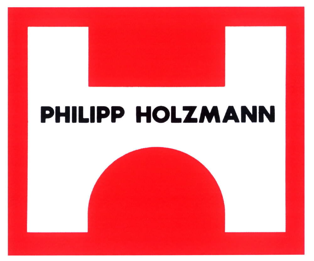 Logo der Philipp Holzmann AG.